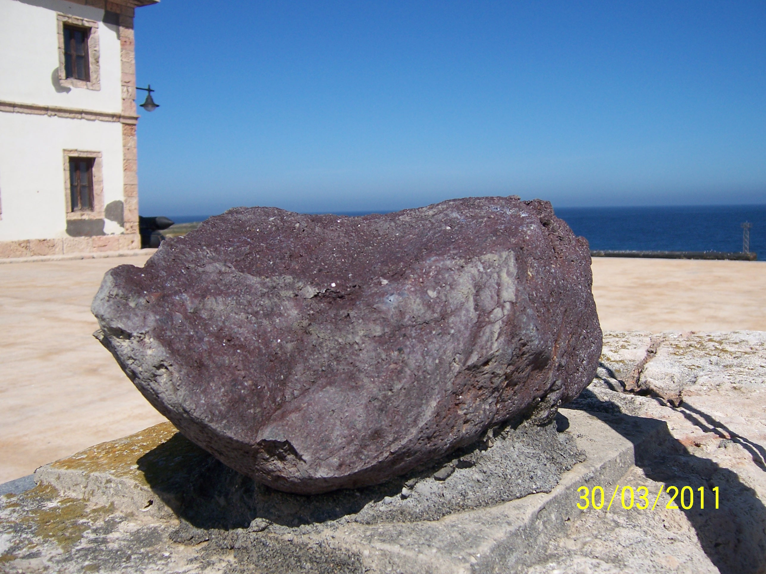 MINERAL ALBORANITA